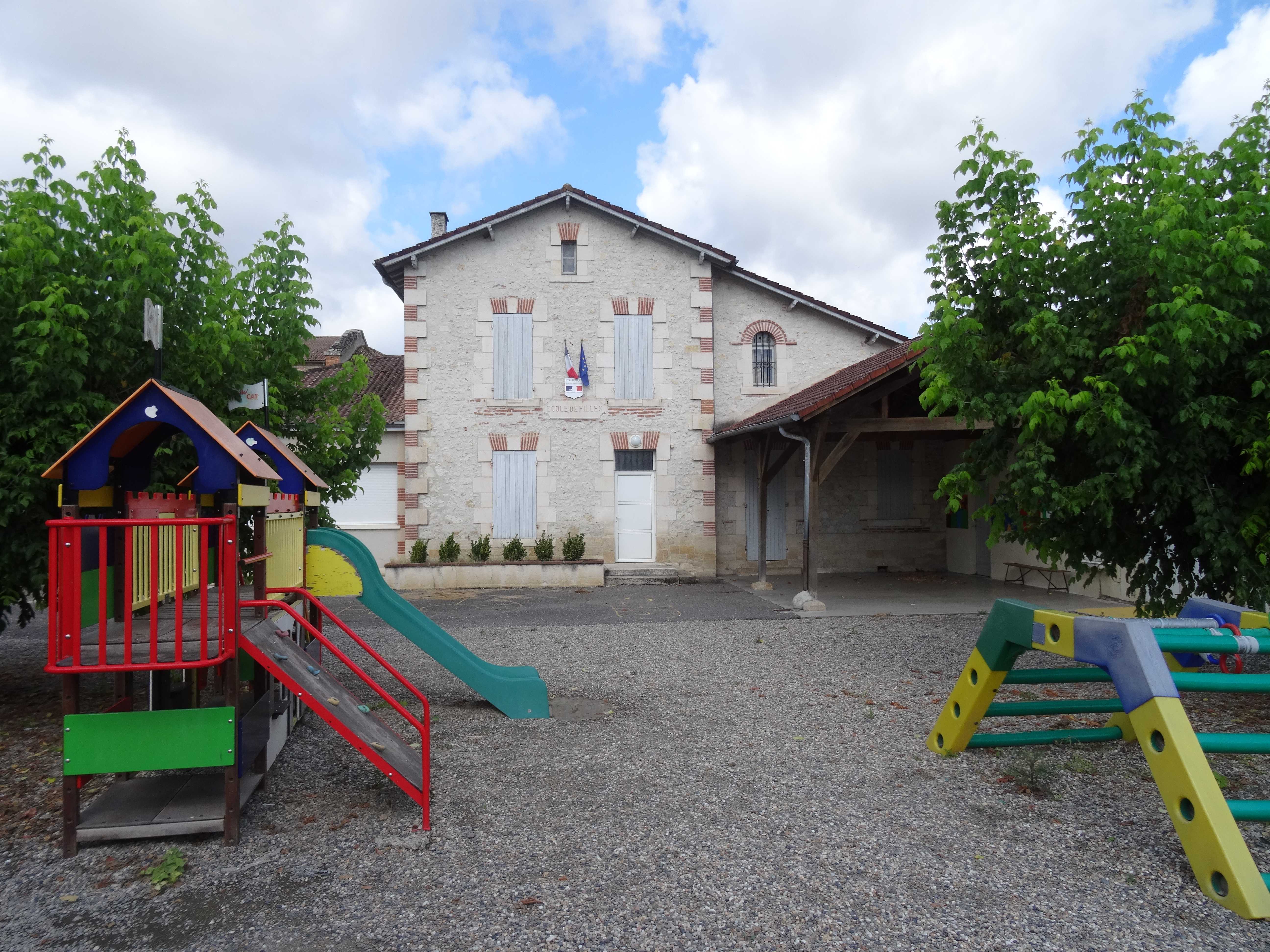 Sauveterre-Saint-Denis (47) : l'école primaire publique